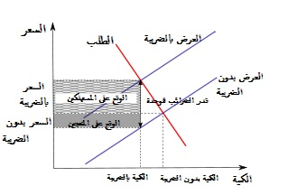 مخطط مرونات الأسعار القابلة للمقارنة